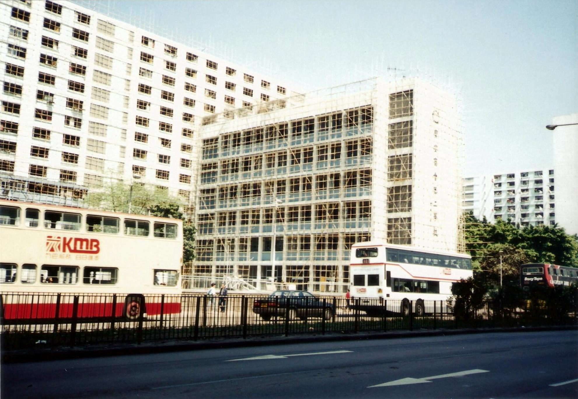 1994年的元洲街邨